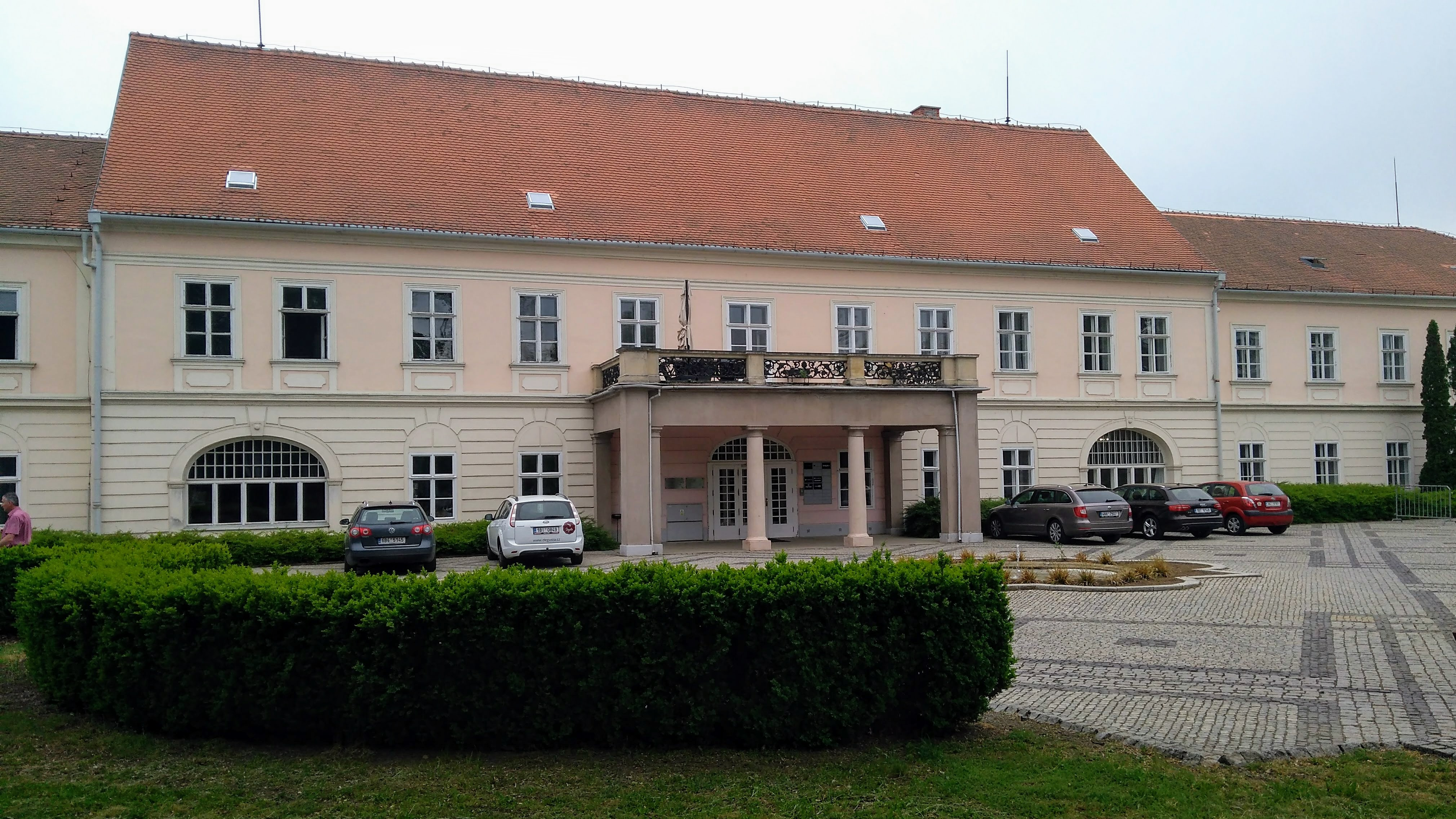 Brněnské výstaviště se zámkem, Výstaviště 405/1, 483/2, (Křížkovského 164), Brno-střed, Pisárky.